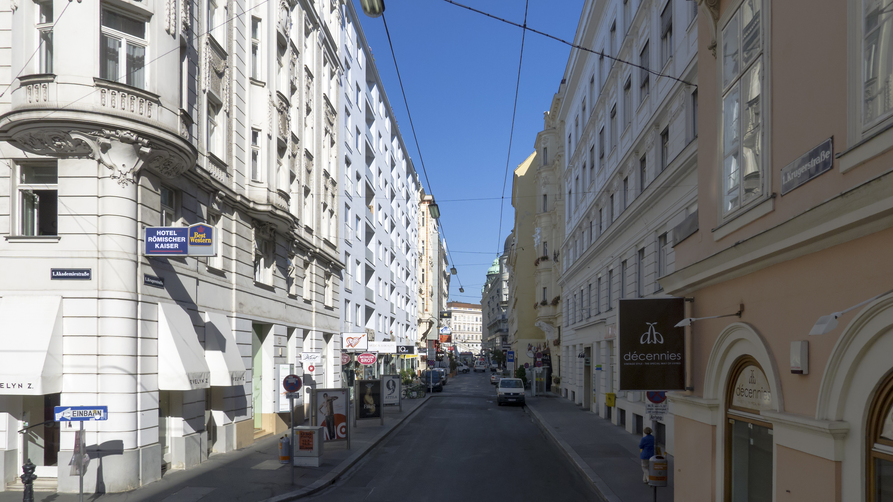 Krugerstraße in Wien 1 bei der Akademiestraße Richtung Westen